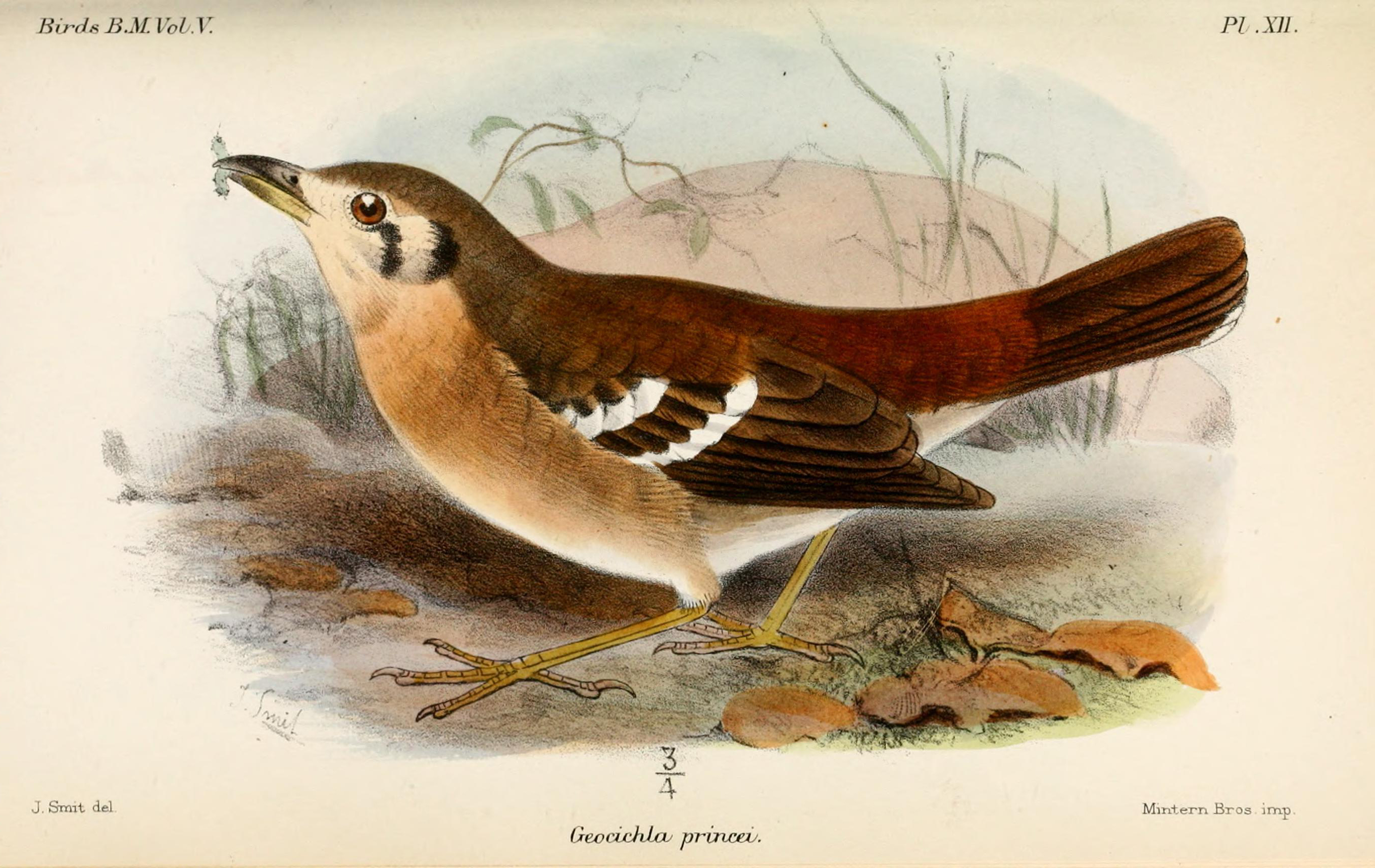 Geocichla princei